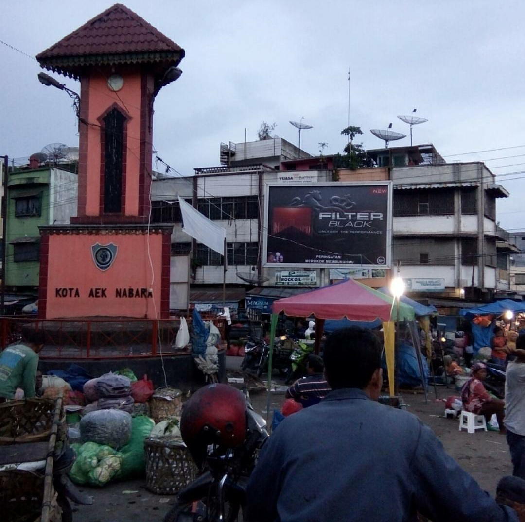 Pertigaan kota Aek Nabara dan Pasar Baru Aek Nabara. Credits : Martin S.S.